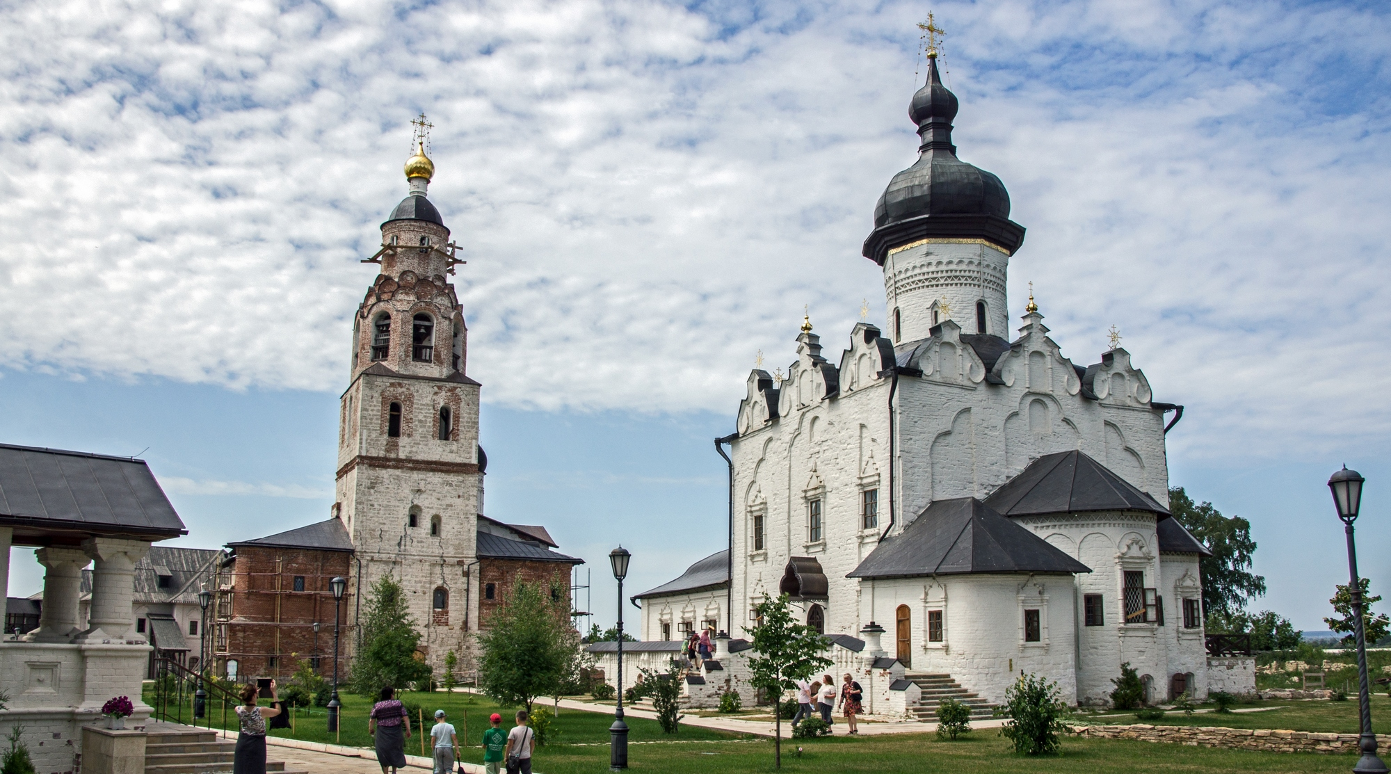 Успенский собор: Свияжск, Зеленодольский район, Татарстан